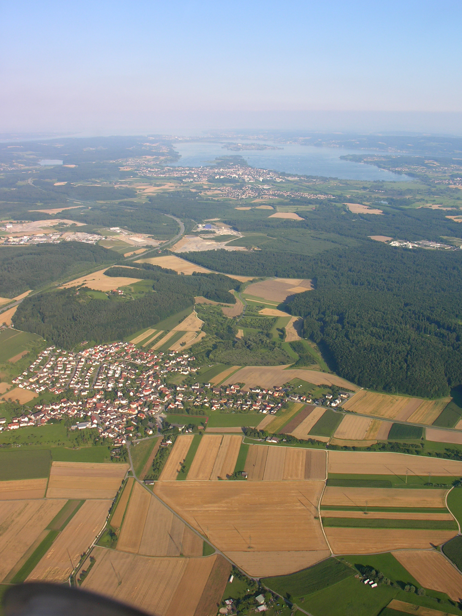 Aerial View of Friedingen